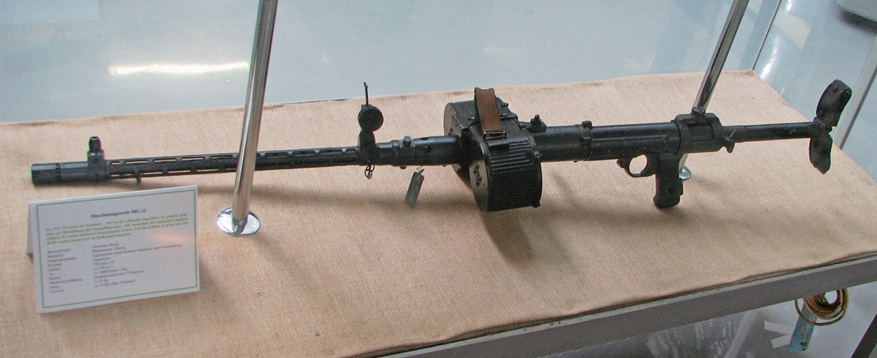 Dieses Bild zeigt ein MG15.